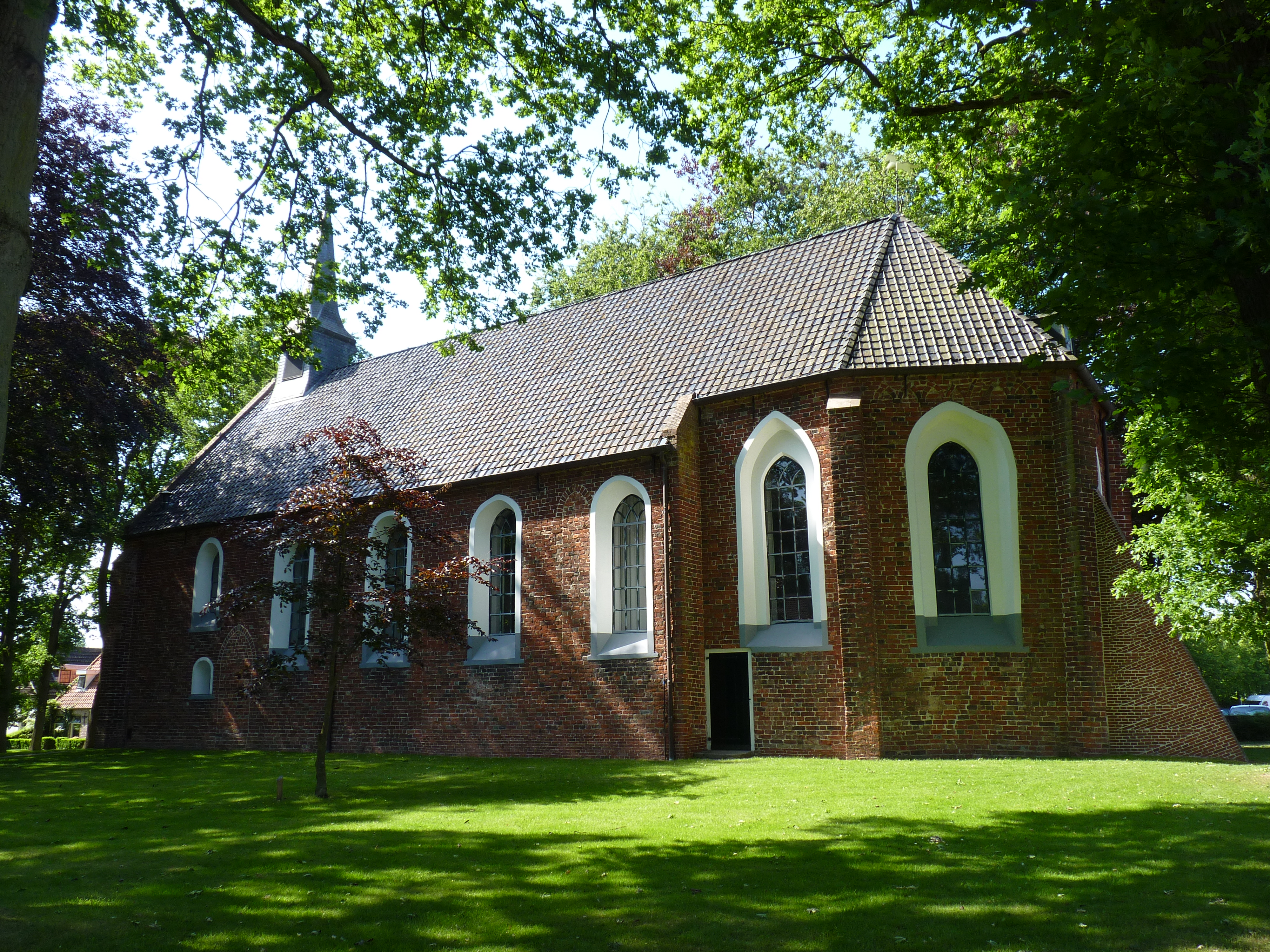 Eelde Hervormde Kerk